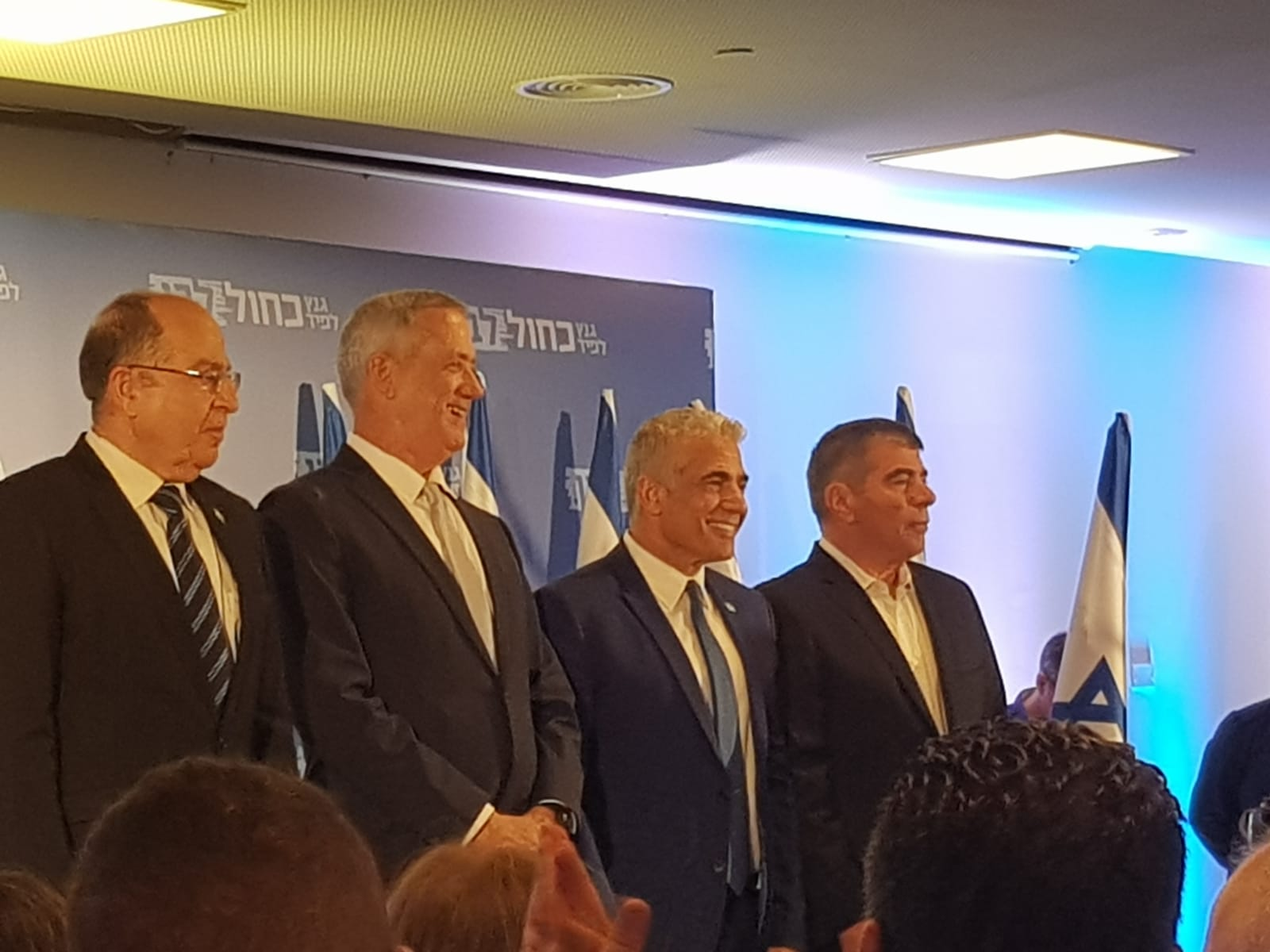 מסיבת עיתונאים, מפלגת כחול לבן, בוגי יעלון וגבי אשכנזי, יאיר לפיד ובני גנץ